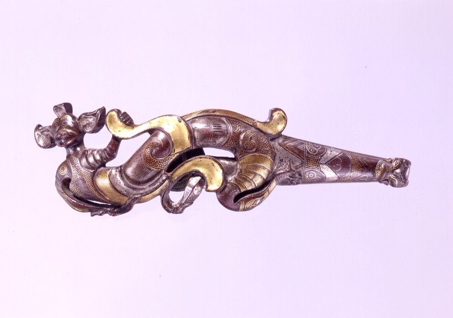 China; Belt hook; Metalwork